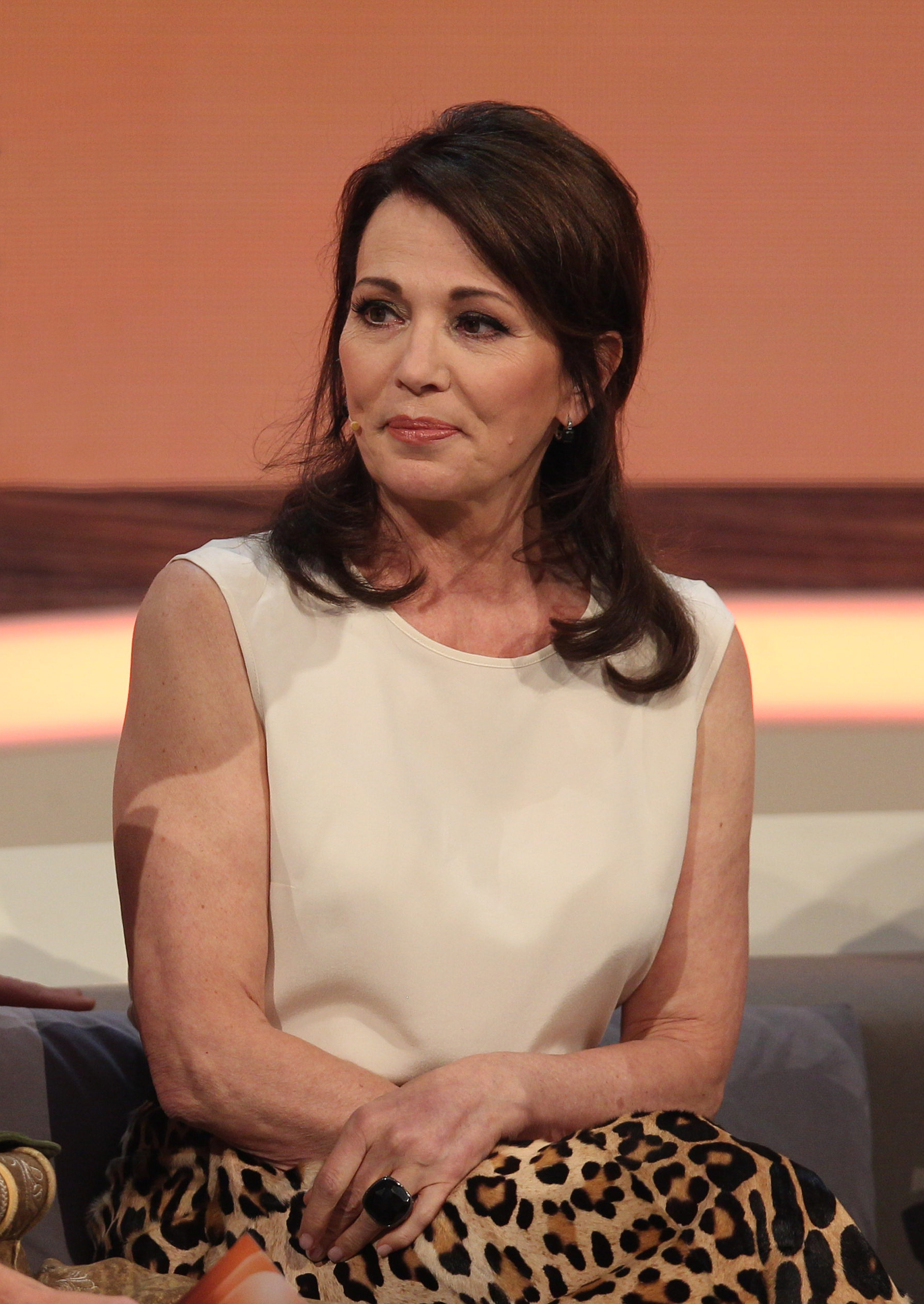 Wetten, dass.. ? 214. show in Graz, 8. Nov. 2014 Iris Berben at 214. Wetten, dass.. ? show in Graz, 8. Nov. 2014